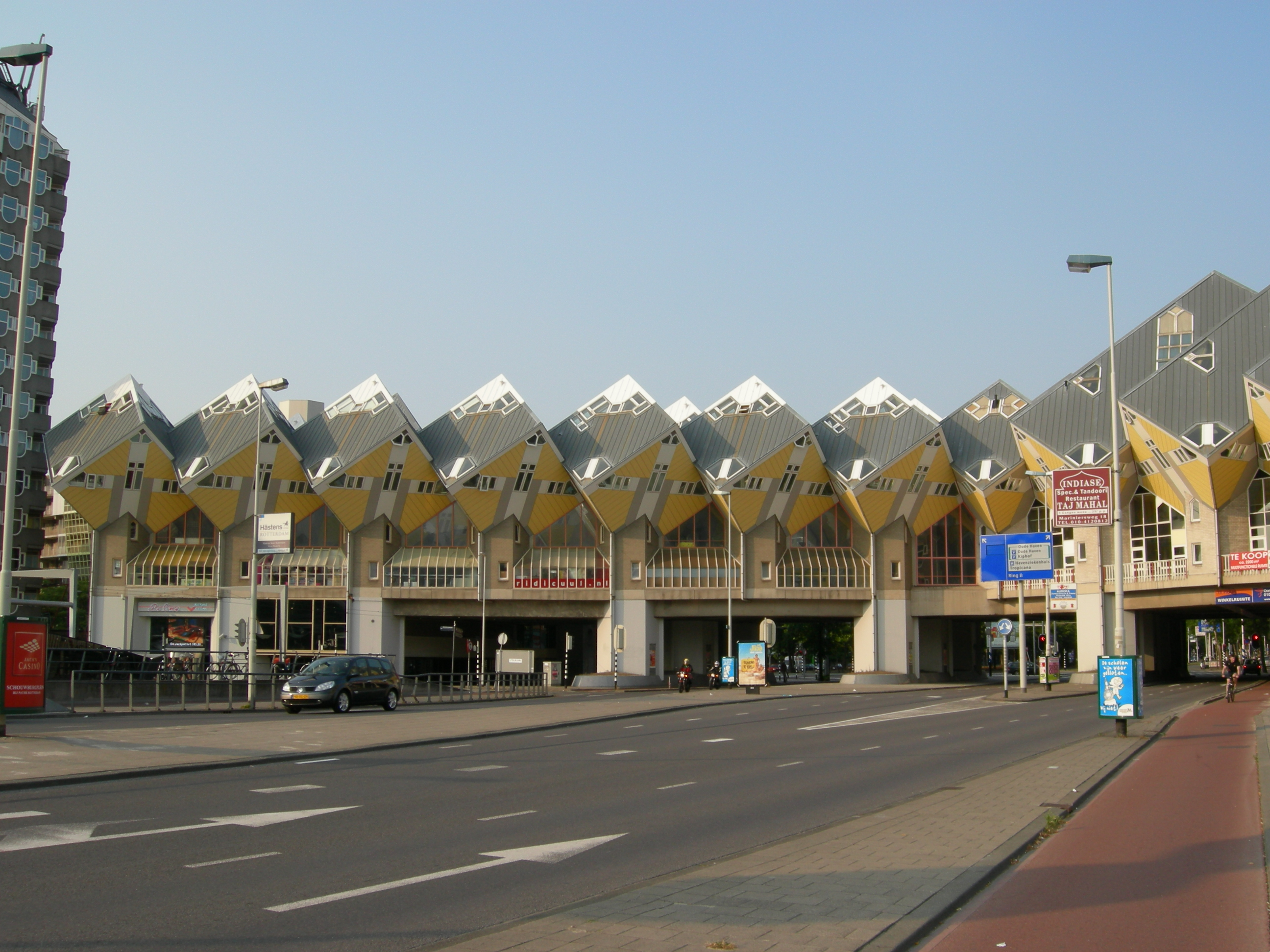 Case cubiche